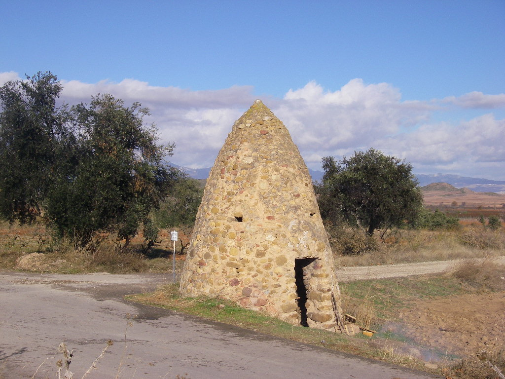 Guardaviñas en el cruce de los caminos de Albelda y Sorzano, Entrena (La Rioja, España)